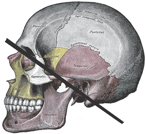 顔面頭蓋と脳頭蓋に分けたもの